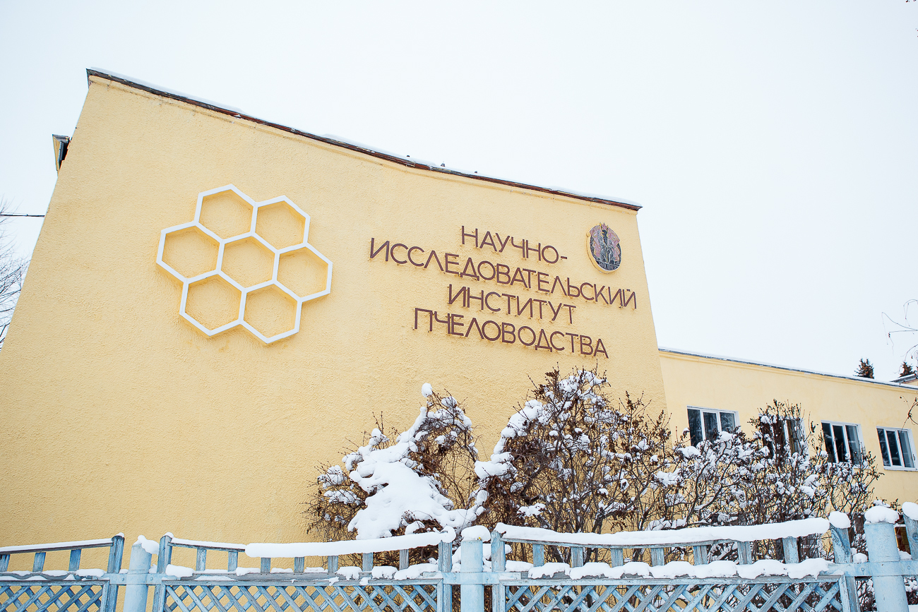 В библиотеке института насчитывается свыше 50 тыс. единиц хранения, в т.ч. есть самые ранние и редкие издания по пчеловодству. Музей-выставка пчеловодства занимает около 500 м и располагает более 2 тыс. экспонатов